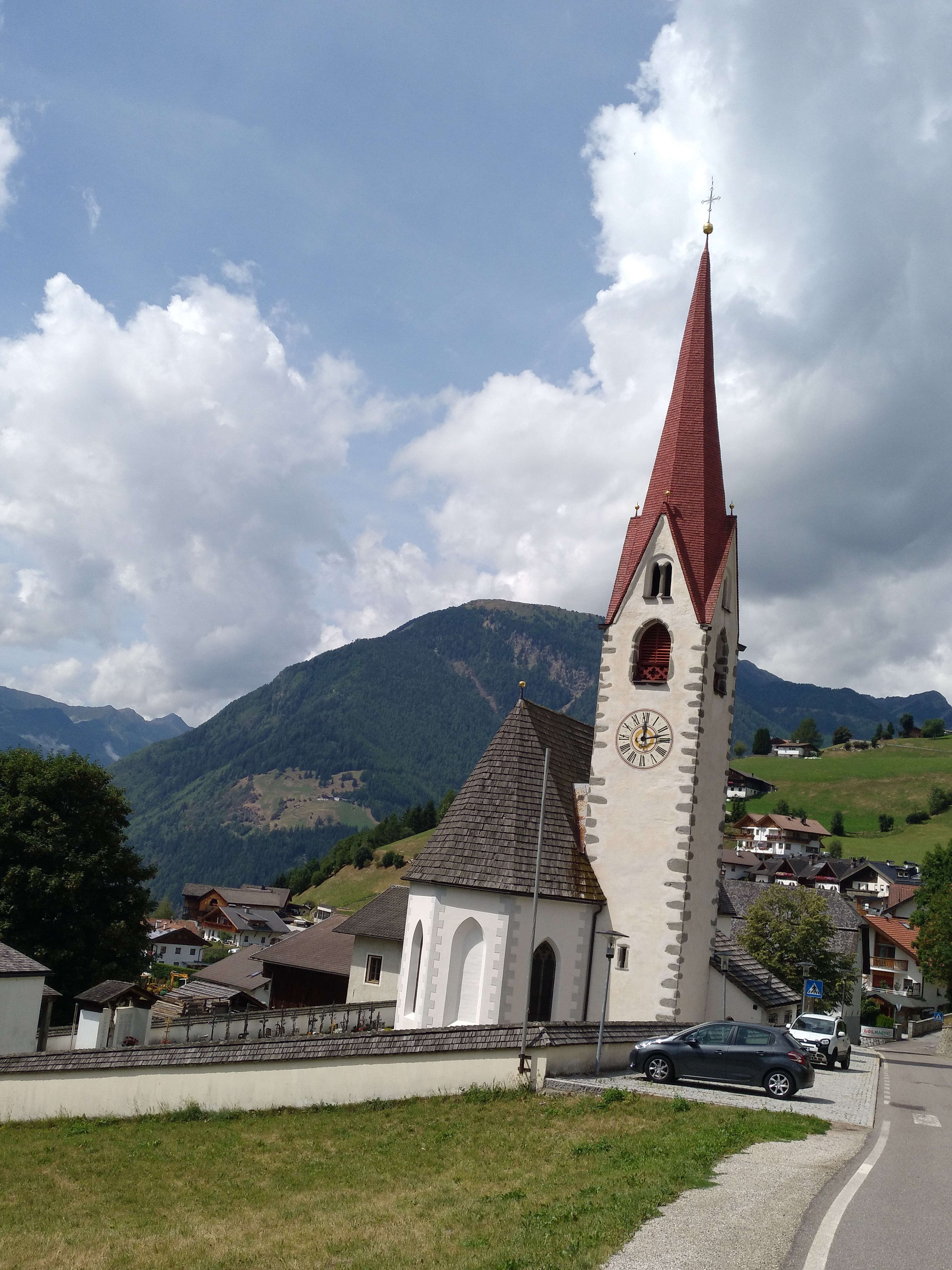 Pfarrkirche St. Anna in Ahornach in Südtirol